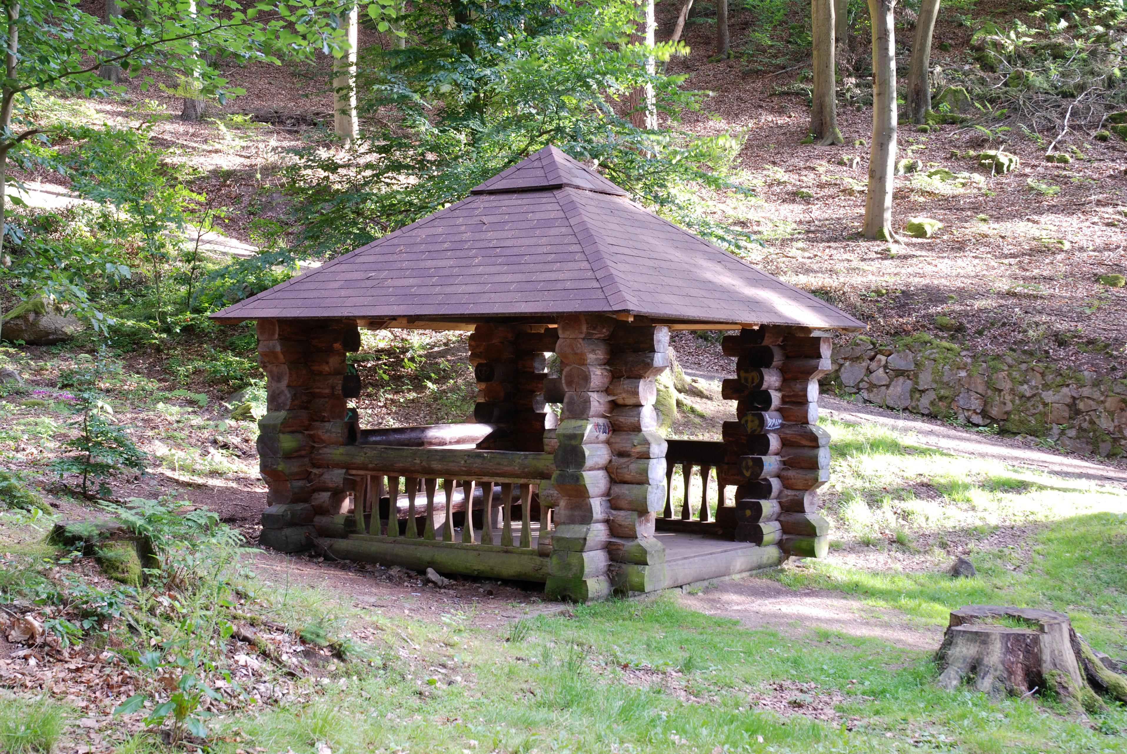 Smrkový srub v karlovarských lázeňských lesích u rozcestí Lesmistrovy cesty s cestou V Rokli